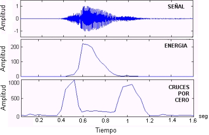 Aparato Fonador Humano